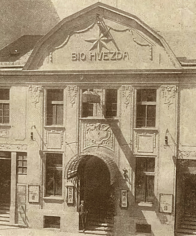 Metzlův dům (Bio Elite, Bio Hvězda, Bio Astra, kino Oko, Malé divadlo) v roce 1928.